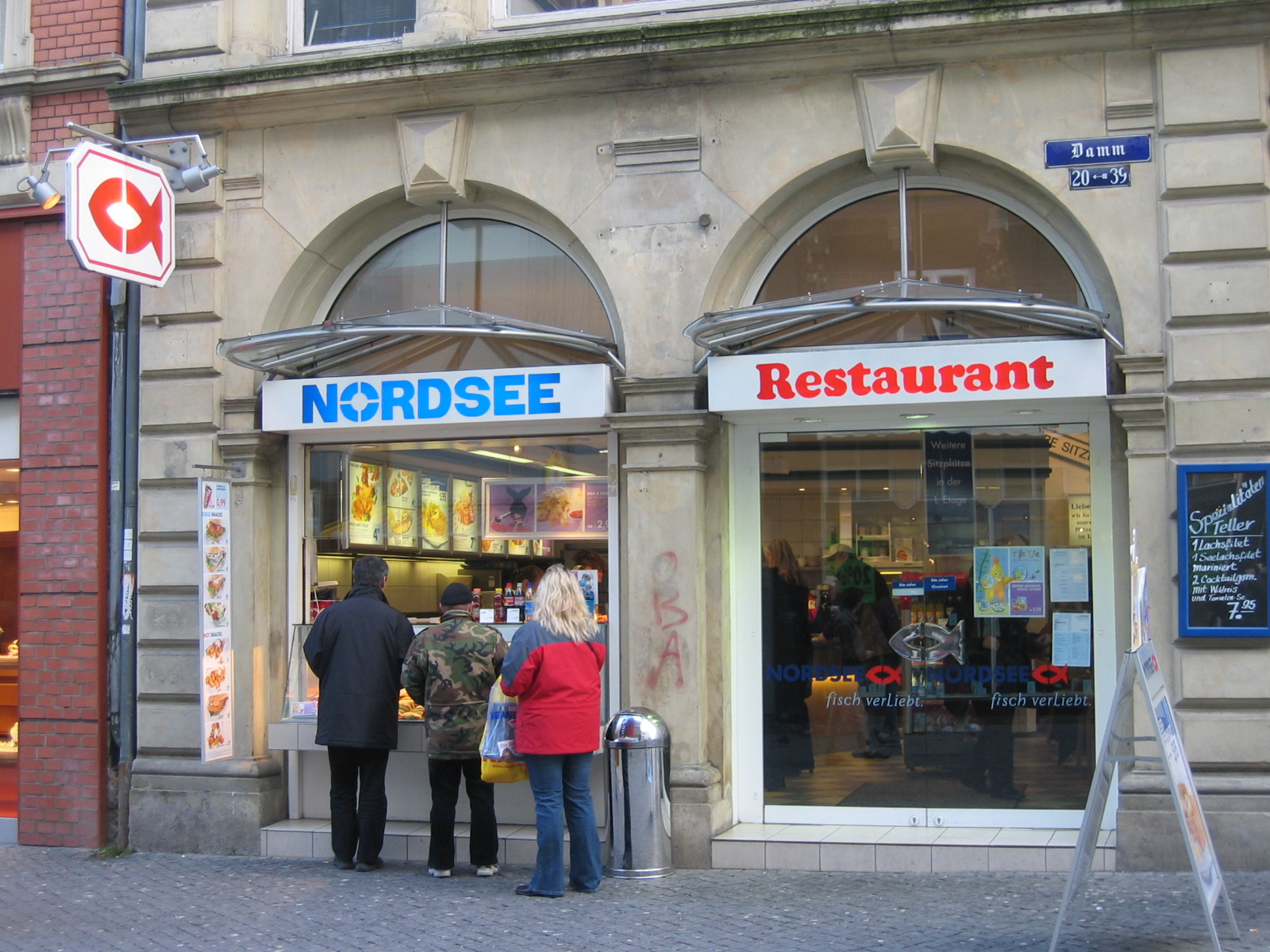 NORDSEE-Restaurant in Braunschweig (Brunswick), Germany